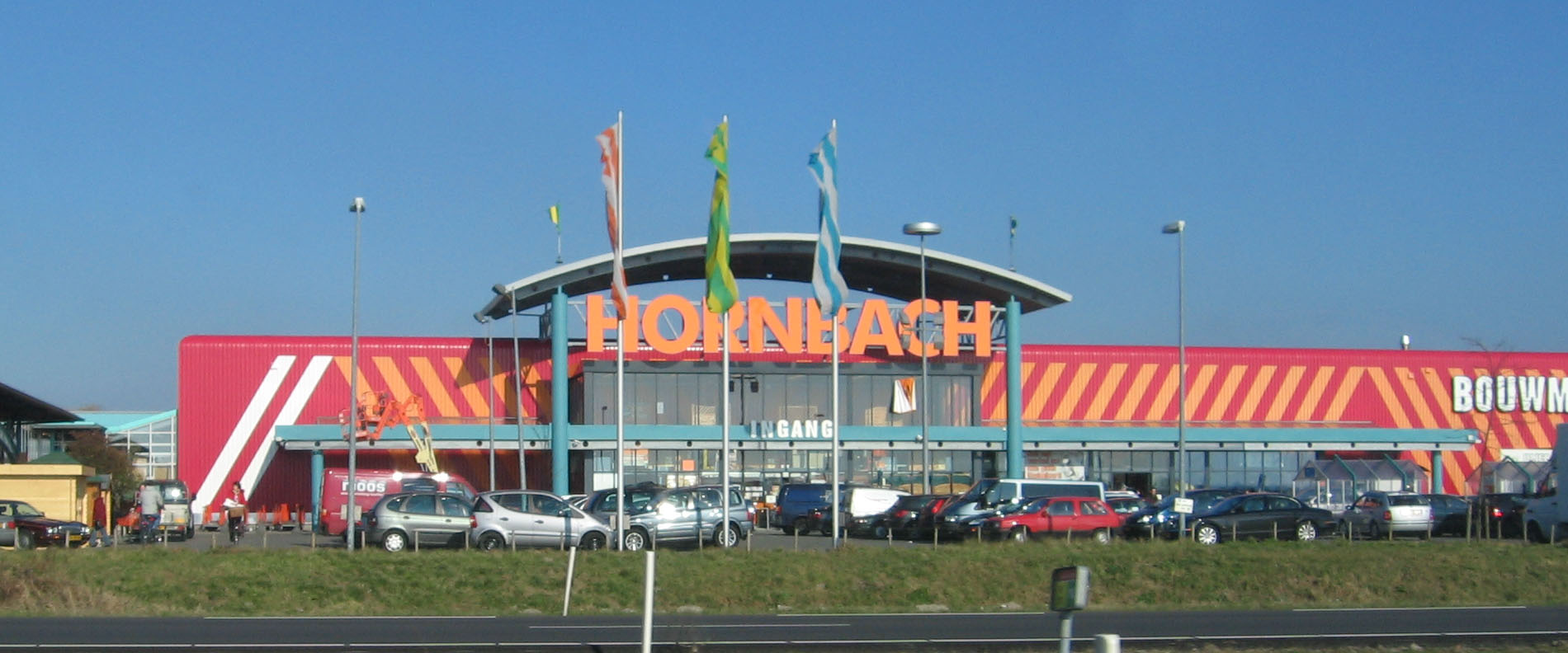 Hornbach, Wateringen, 25 feb 2006